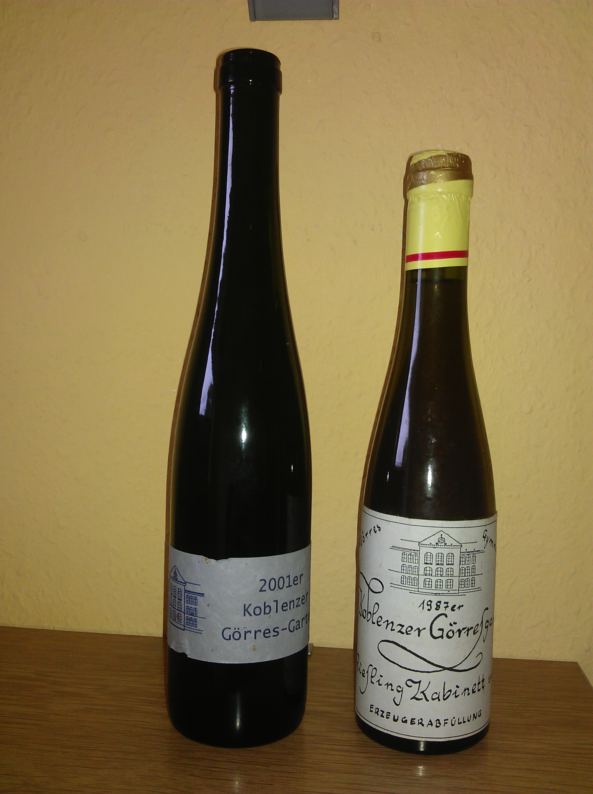 2 Flaschen Koblenzer Görresgarten Riesling Kabinett 1987 und 2001: Der Wein wurde bis in die 00er Jahre des 21. Jahrhunderts jährlich aus den auf dem Schulhof des Görres-Gymnasiums Koblenz wachsenden Weintrauben gekeltert. Da dort nur eine geringe Menge Reben wuchsen, ist jede der Flaschen eine Rarität, sie wurden fast nur als außergewöhnliche Präsente vergeben, für Menschen, die sich um das Görres-Gymnasium Koblenz verdient gemacht haben und waren niemals auf dem Weinmarkt erhältlich. Diese beiden Flaschen stammen aus dem Nachlass von R. Dahm.